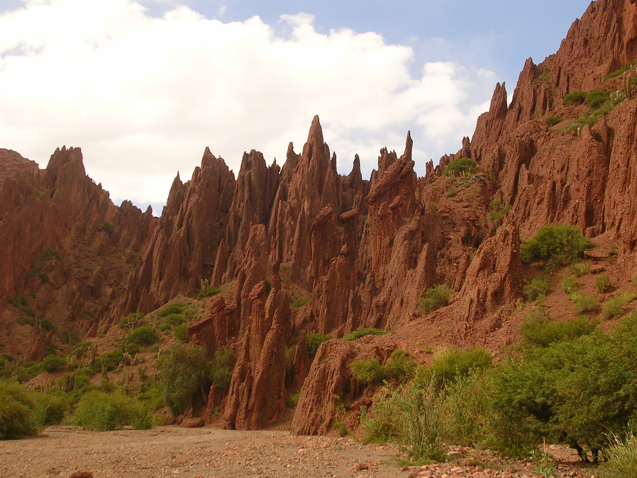 Petroglifos en el camino hacia el cañón del Inca en Tupiza (Bolivia)